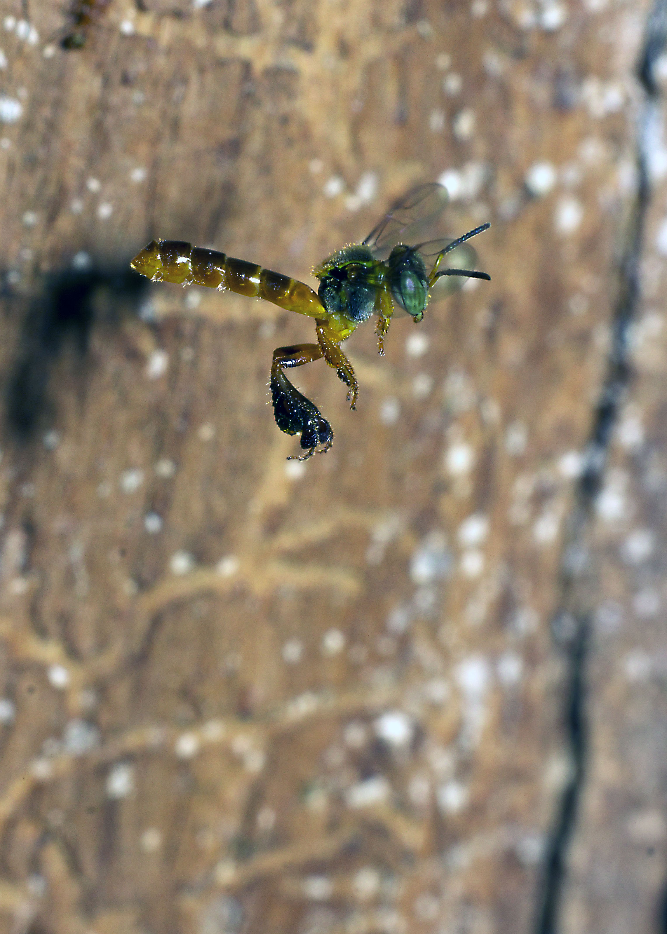 Soldado da abelha jataí paira em frente ao pito de entrada da colmeia.